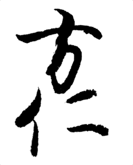 正親町天皇の親署「方仁」